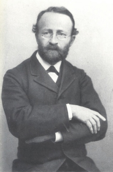 Max Westermaier (1852-1903), Professor der Botanik